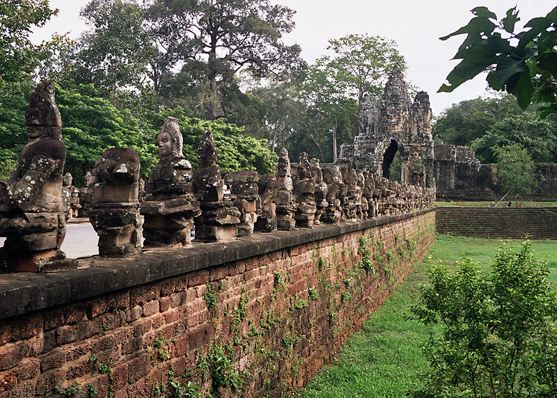 Pont i Porta Sud d’Angkor Thom. Angkor, Cambodja